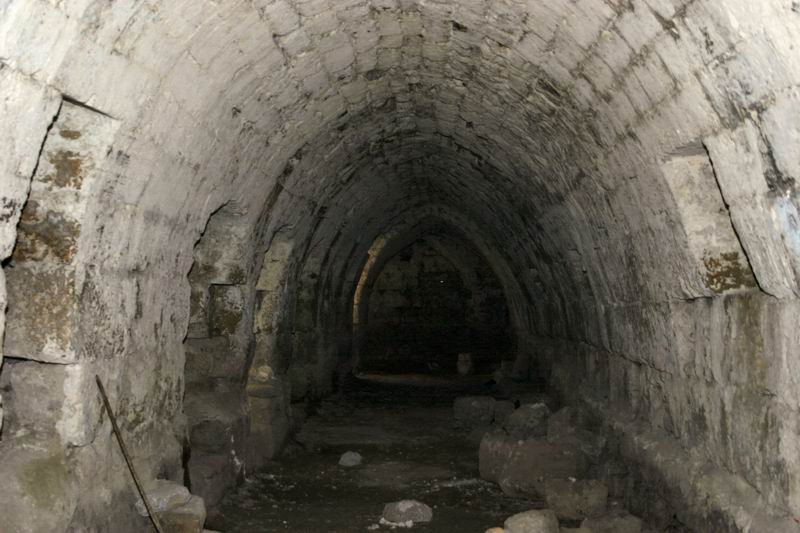 Yahmour